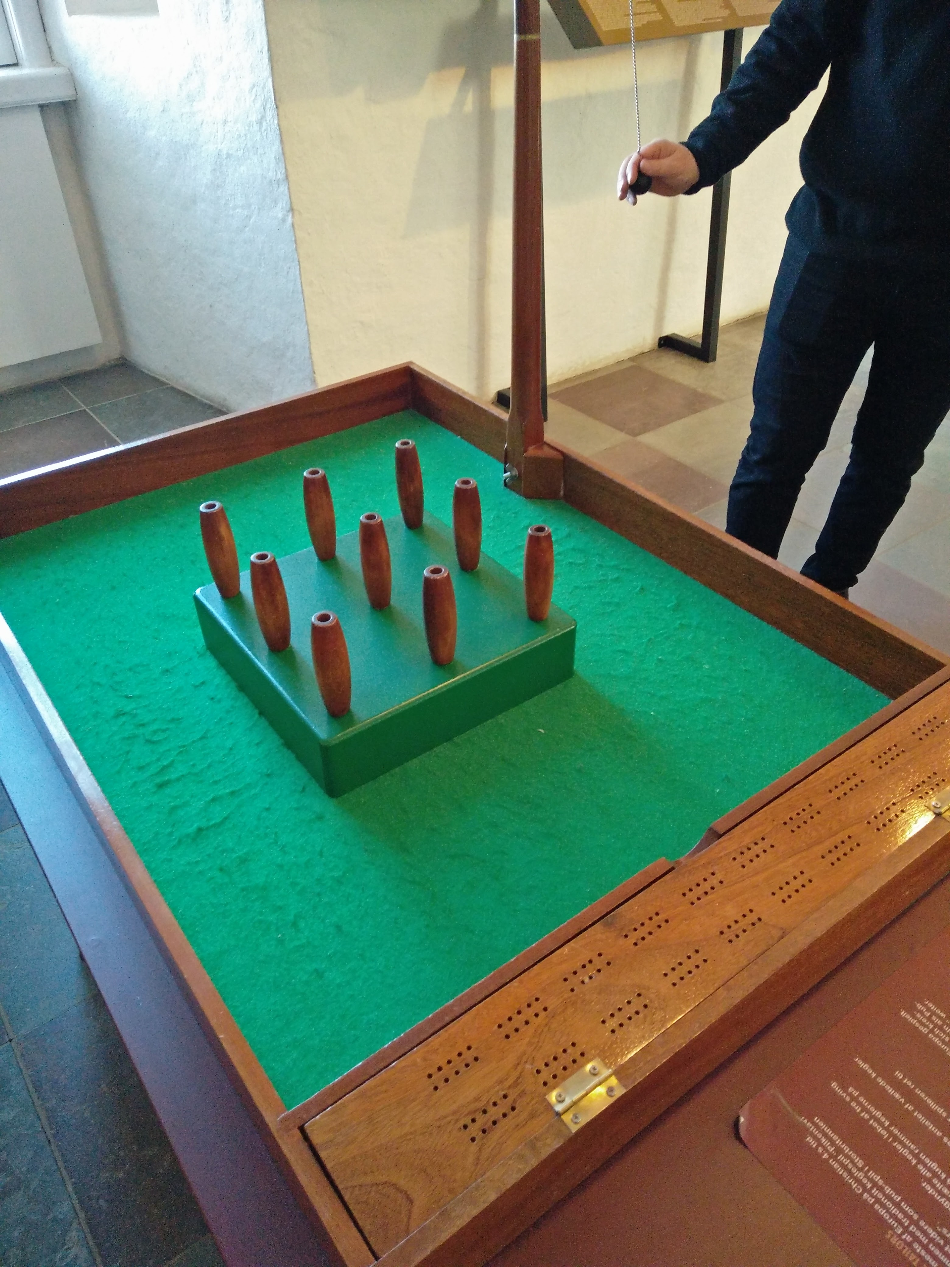 Rekonstrueret "spillebord" til hængekegler på Koldinghus